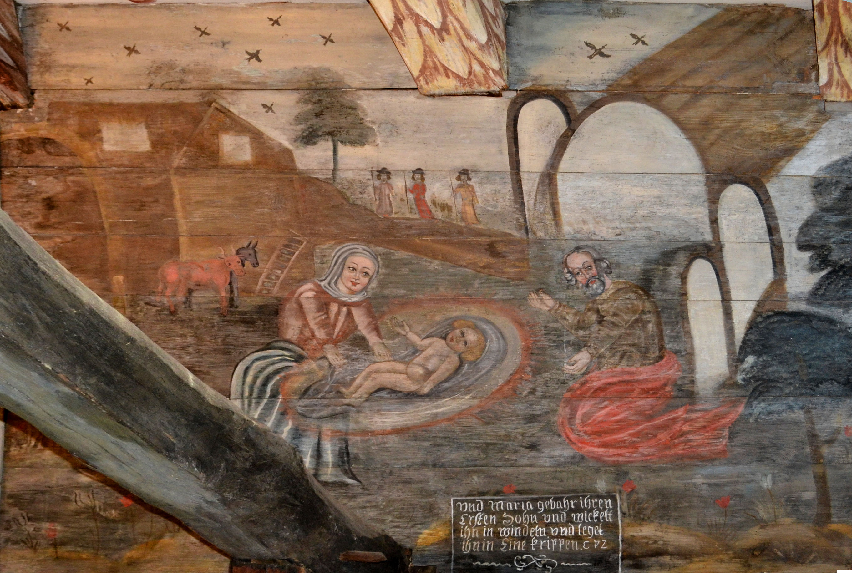 Kościół w Dzisnej (województwo zachodniopomorskie)